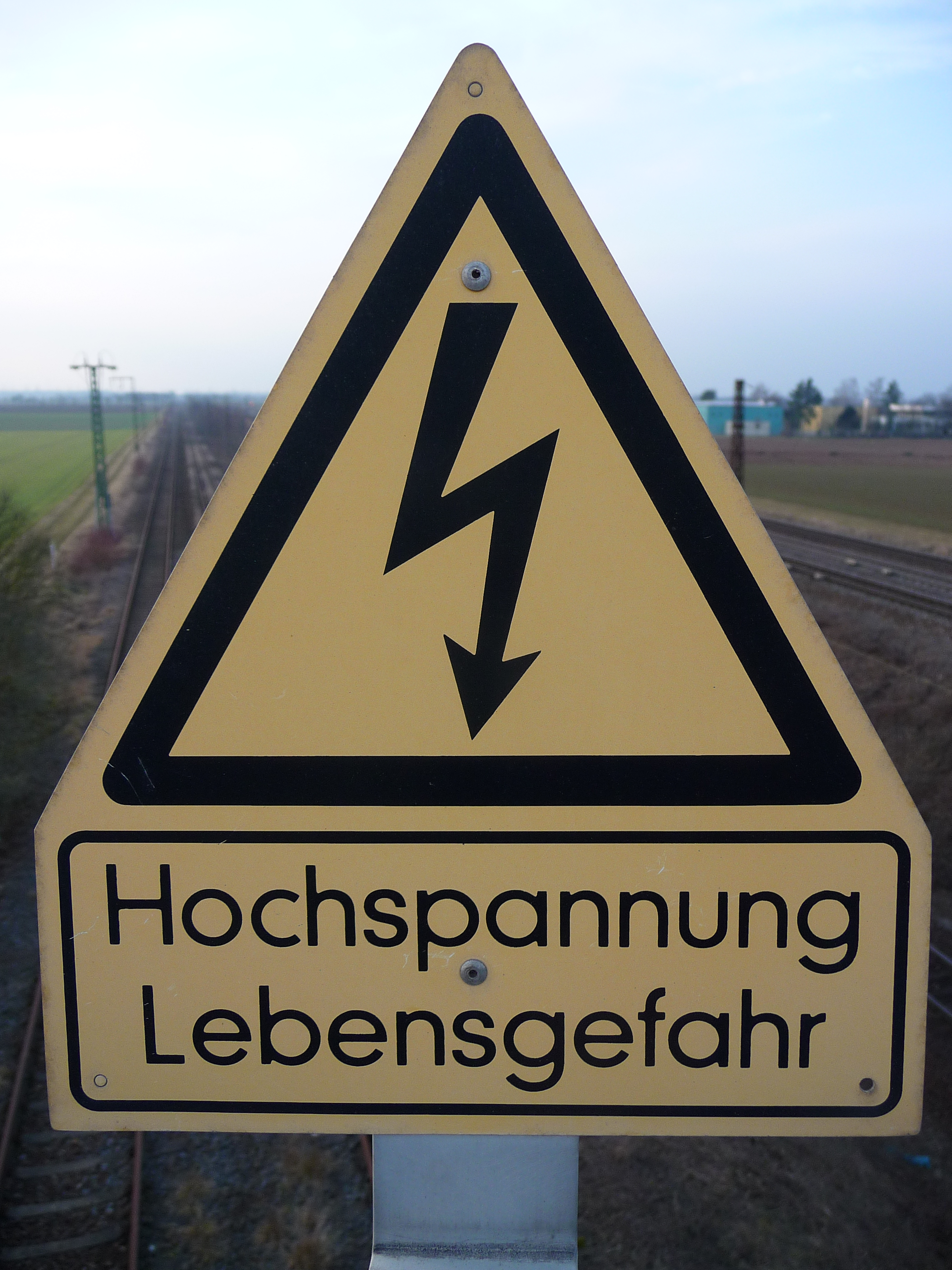 Warnzeichen vor Hochspannungsleitungen